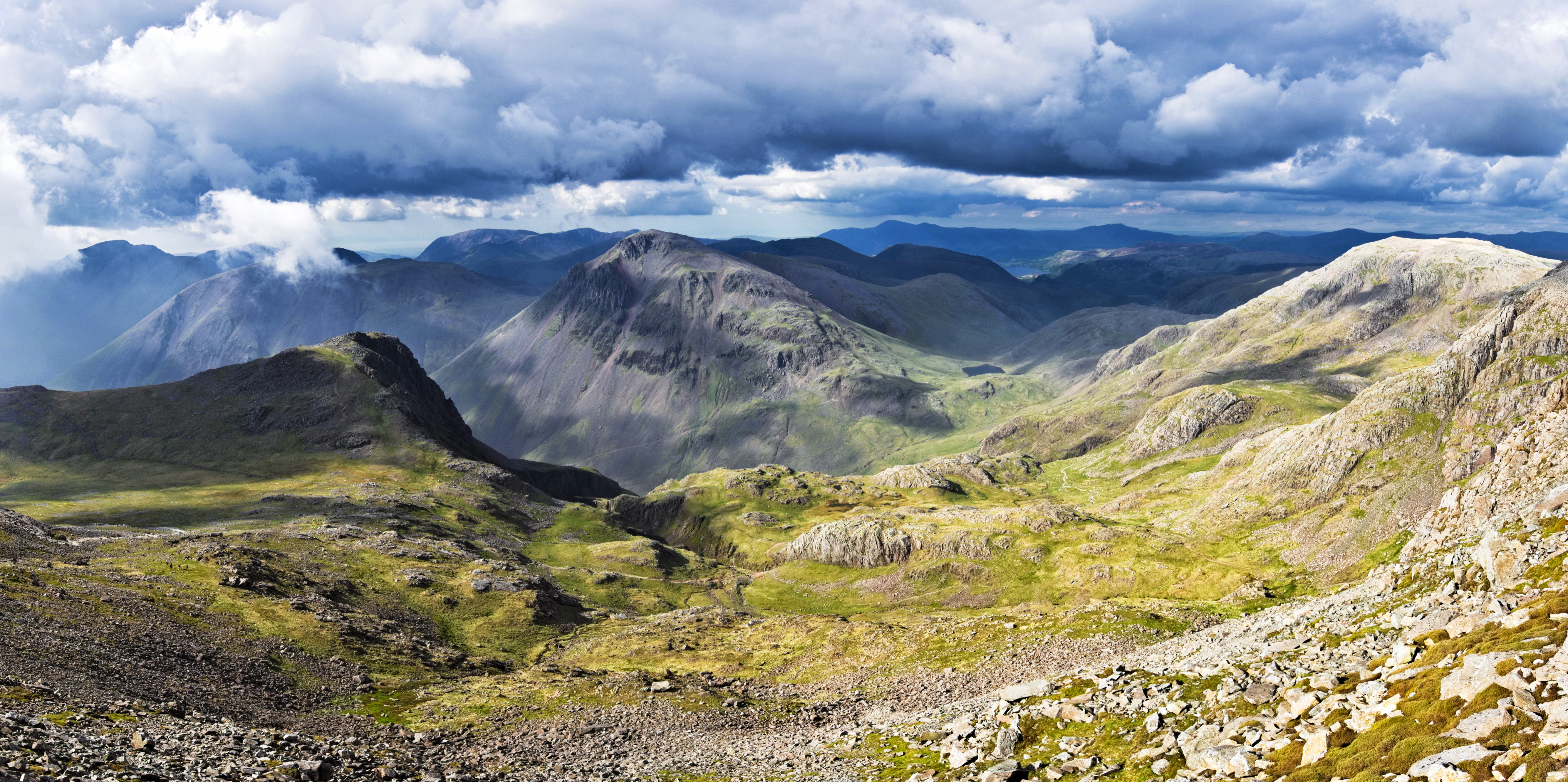 Wasdale, UK